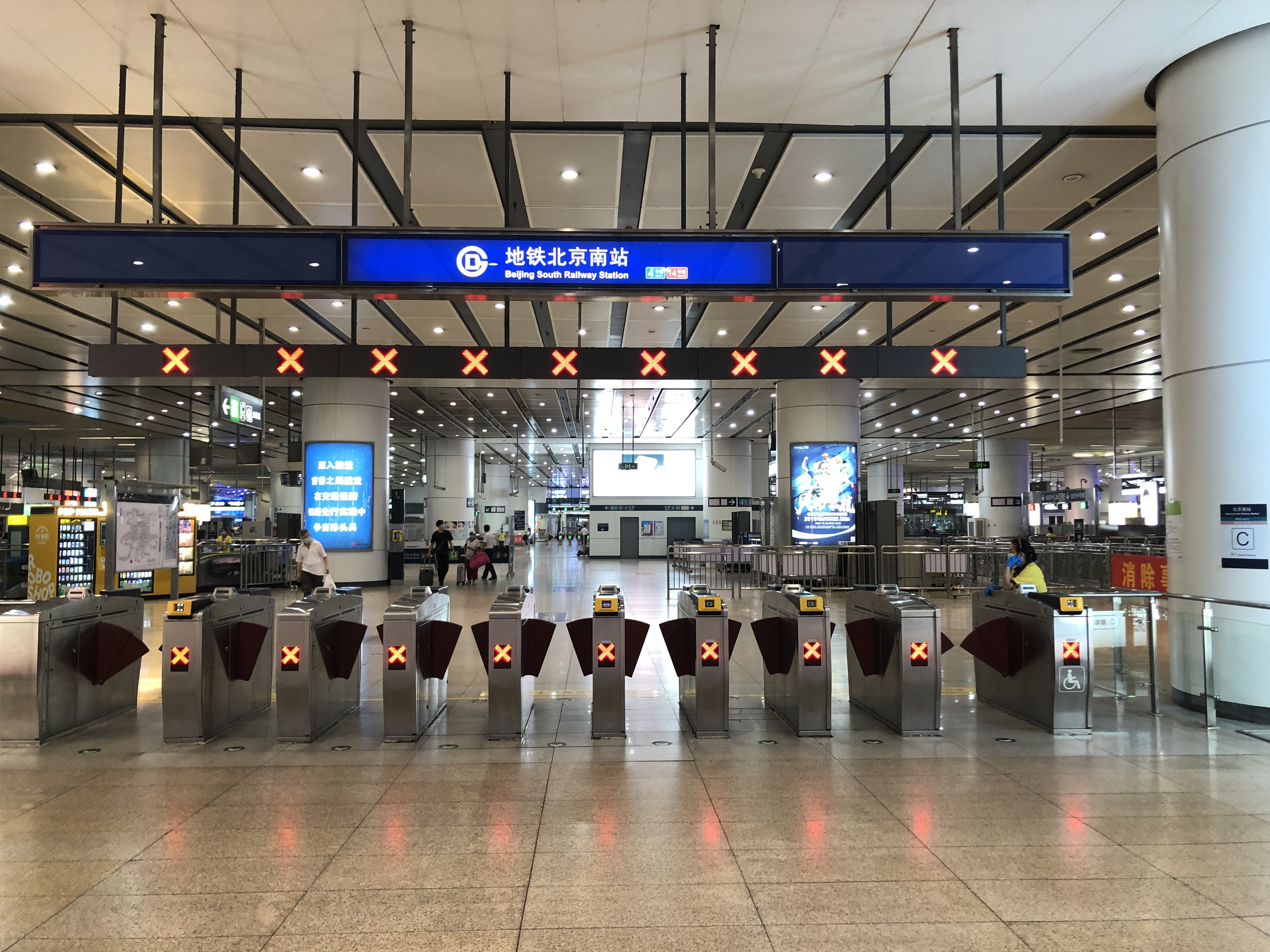 中文（中国大陆）: 北京地铁北京南站C口